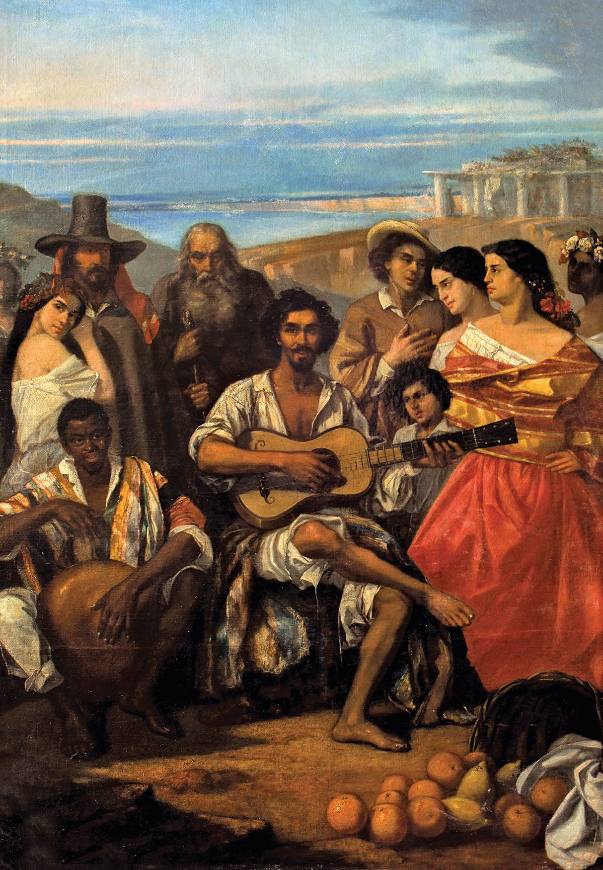 Pintura "La Jarana" del pintor peruano Ignacio Merino.